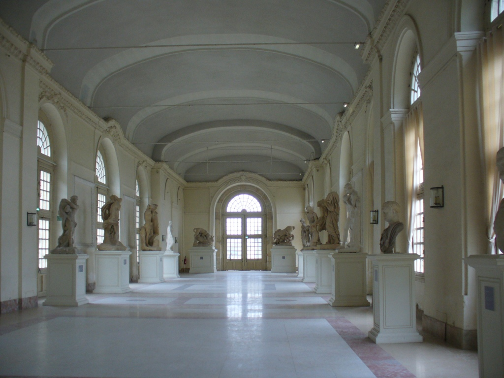 Orangerie du Parc de Sceaux (92)